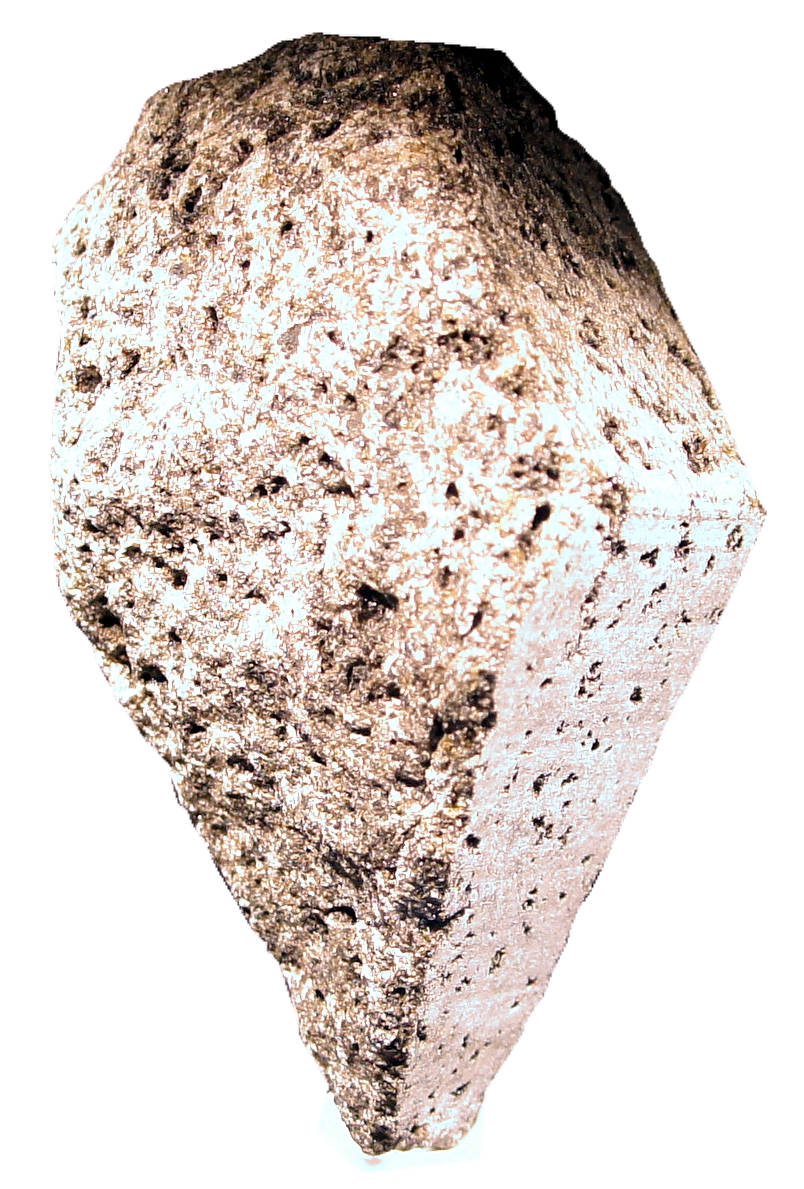 Образец лунной породы (анортозит). Музей авиации и космонавтики, Смитсониан в г. Вашингтон, США.